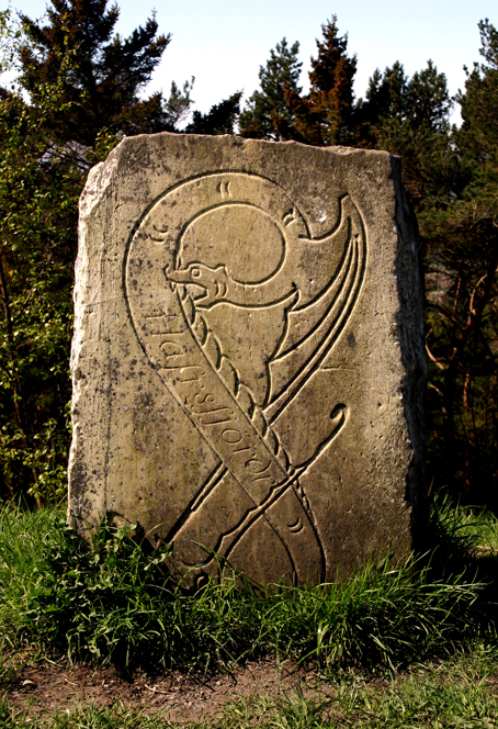 Hafrsfjord rock